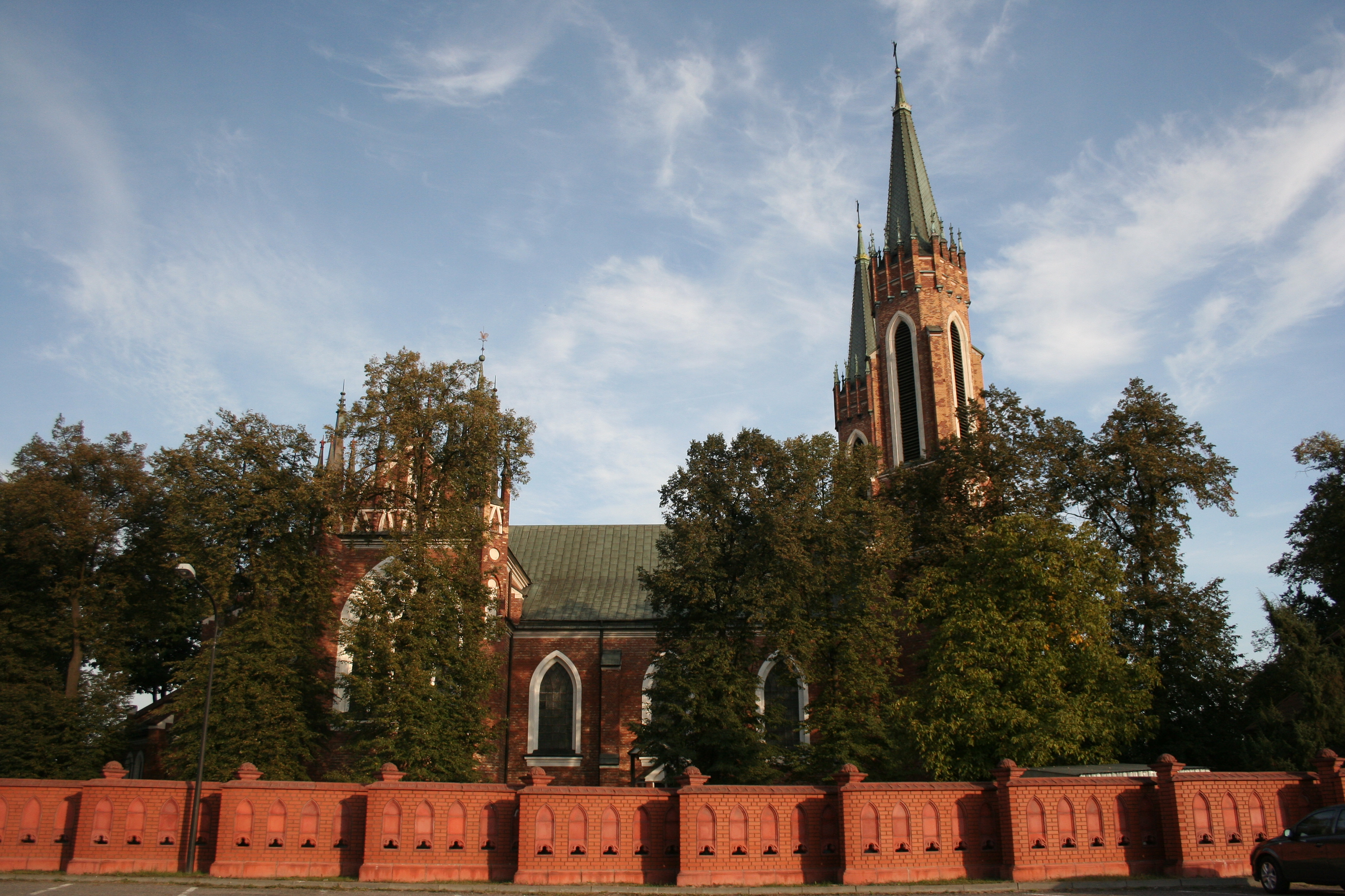 Zespół kościoła par. p.w św. Jana Parczew